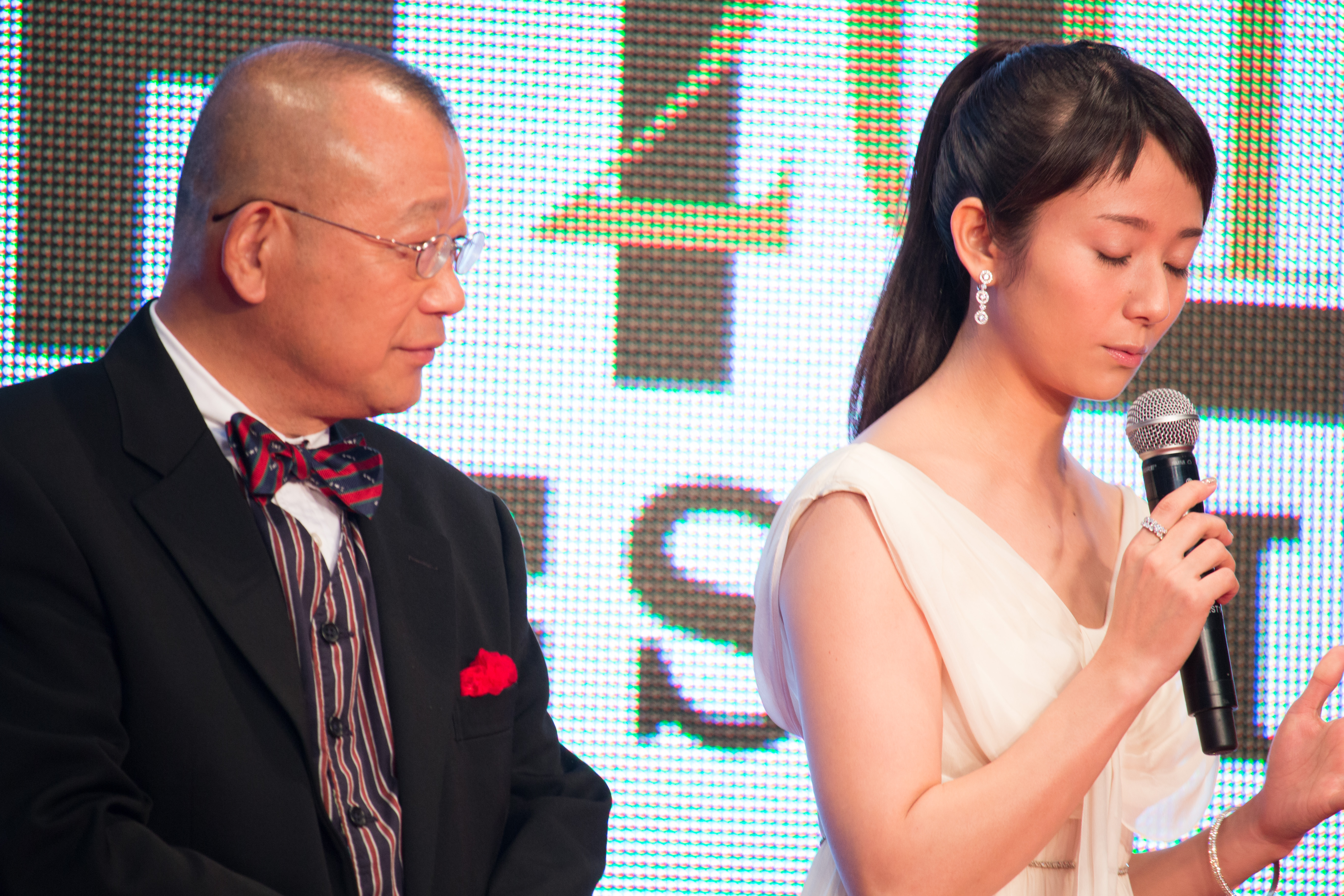 第28回 東京国際映画祭 オープニングセレモニー 笑福亭鶴瓶 木村文乃 (シーズンズ)